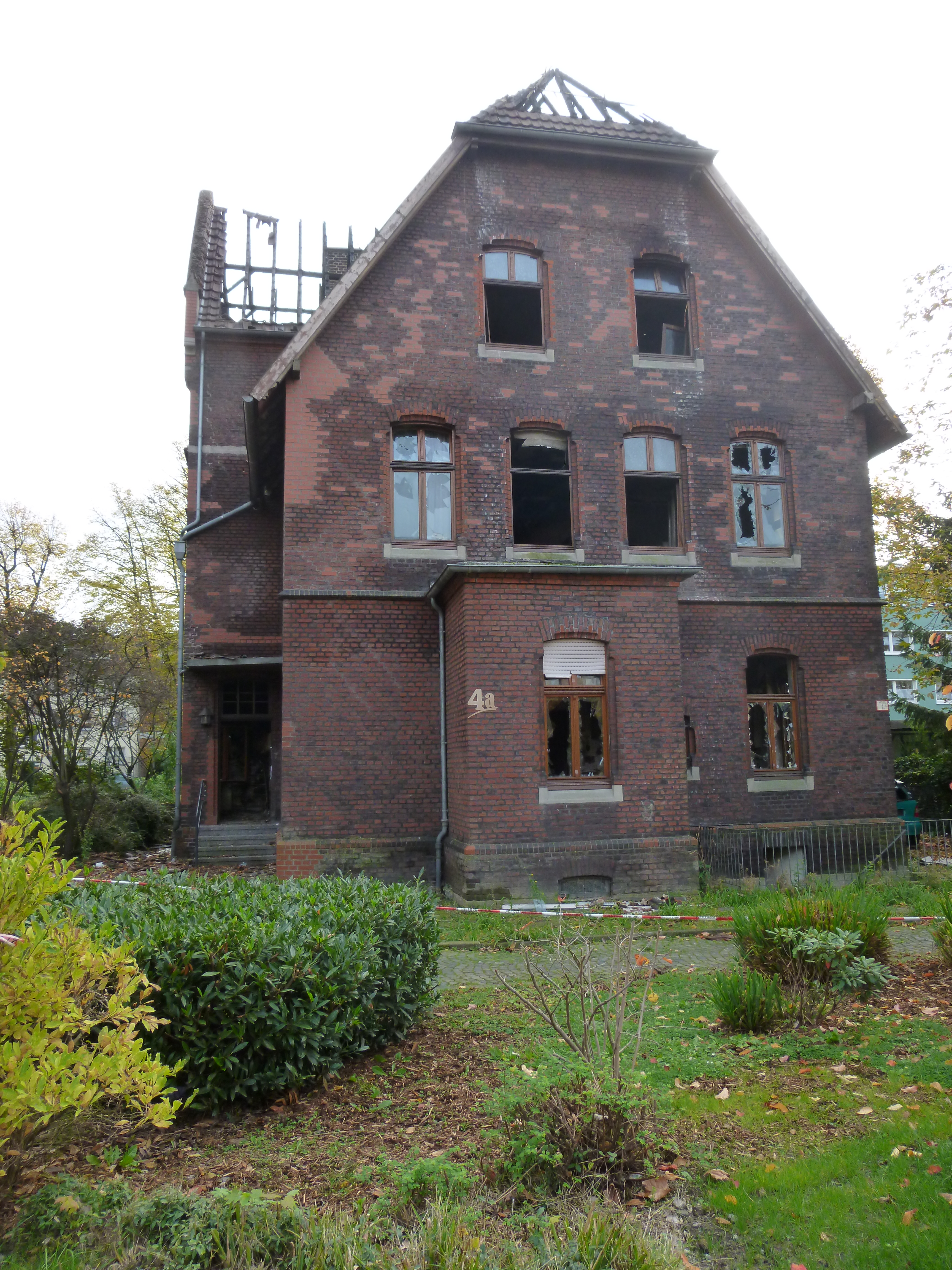 Ehemaliges Pfarrhaus St. Marien in Herne-Eickel, Herzogstr., nach dem Brand vom 15. Oktober 2016, gesehen von der Marienstraße in Höhe Hausnummer 2, Blick auf Vorderfront und linken Eingang